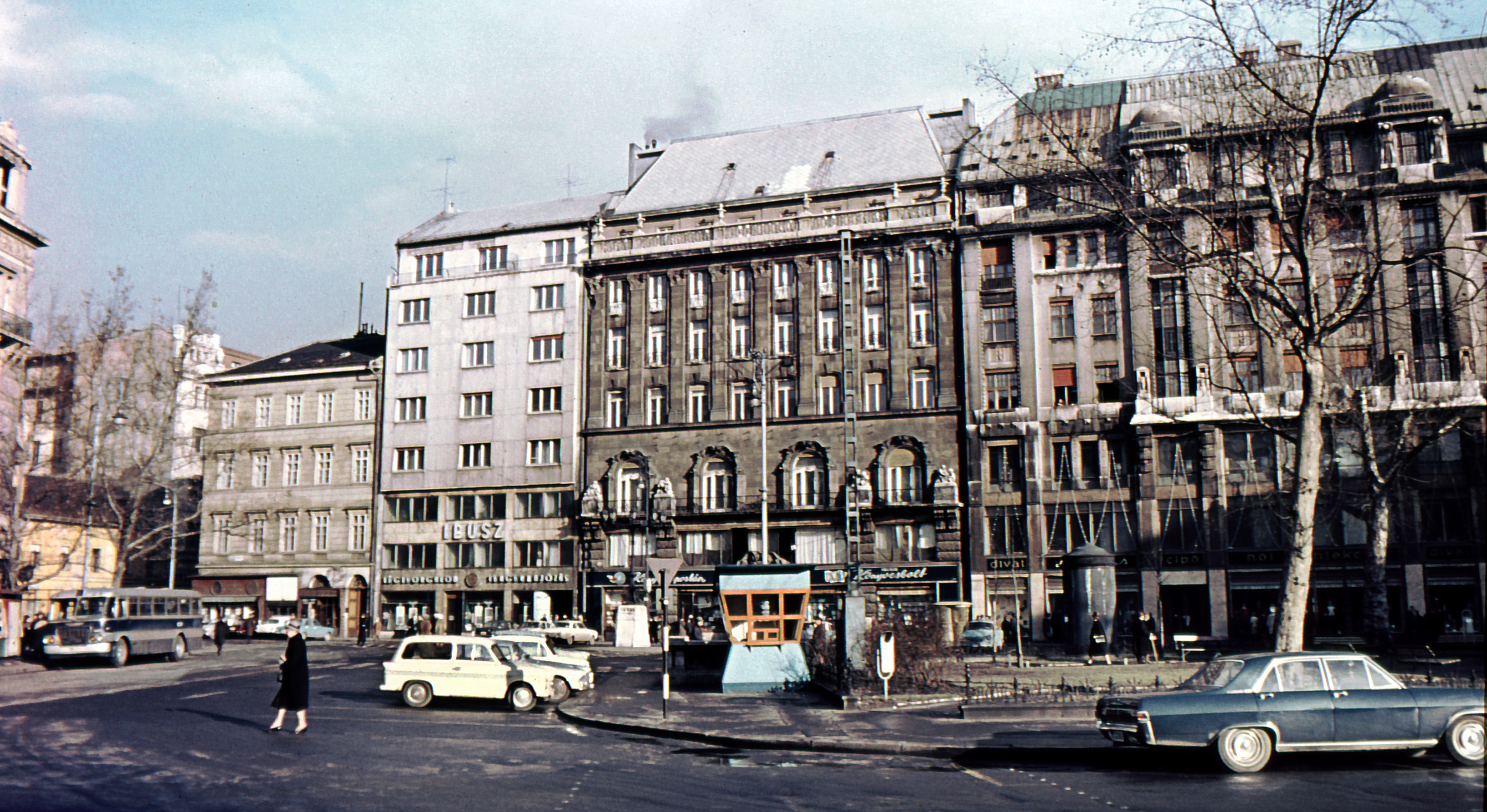 Vörösmarty tér, Budapest V.